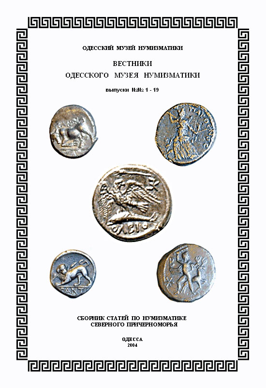 Сборник «Вестников Одесского музея нумизматики»